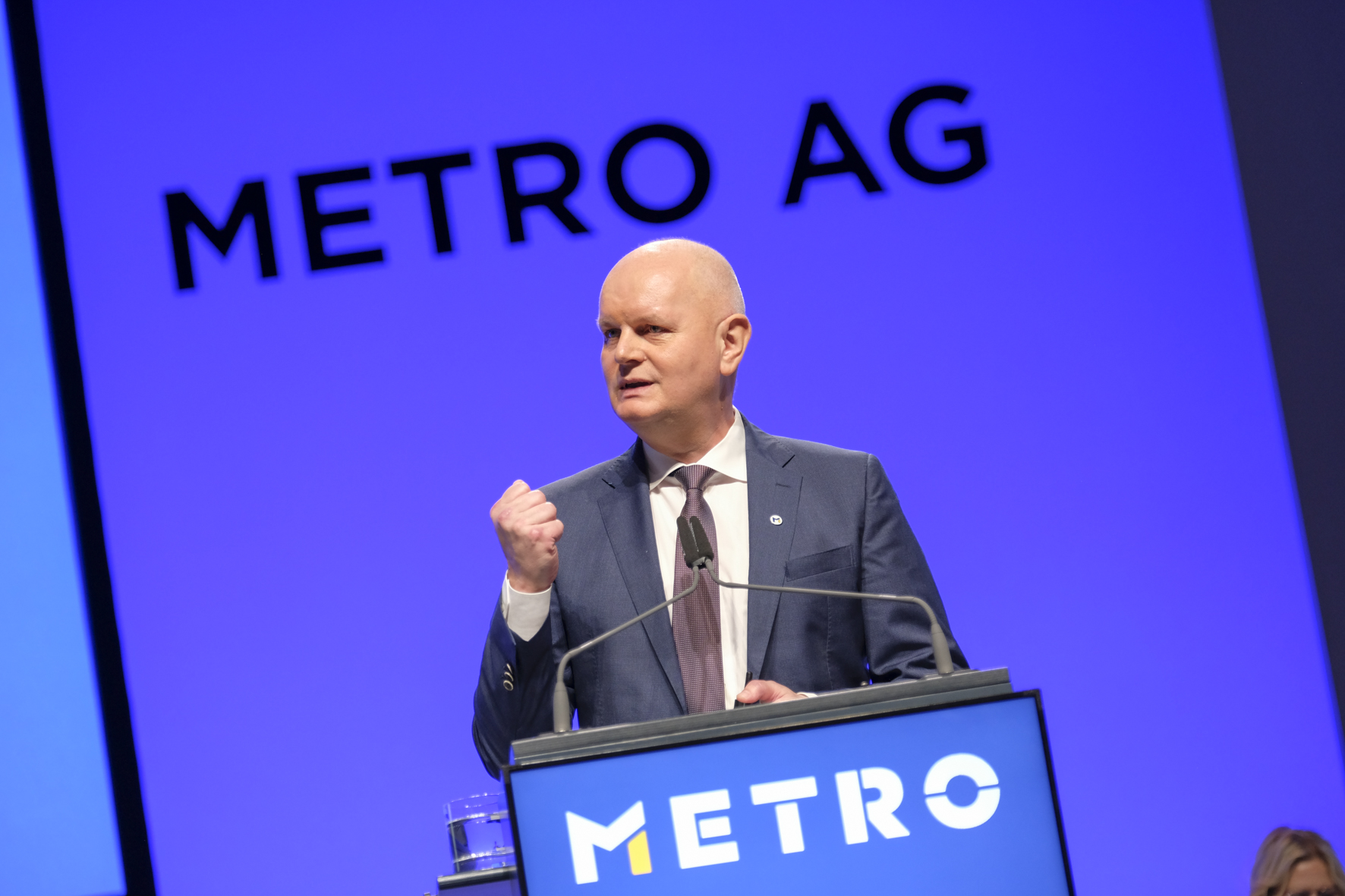 Olaf Koch, CEO Metro AG, bei der Hauptversammlung der Metro AG 2020, in Düsseldorf, am 14. Februar 2020